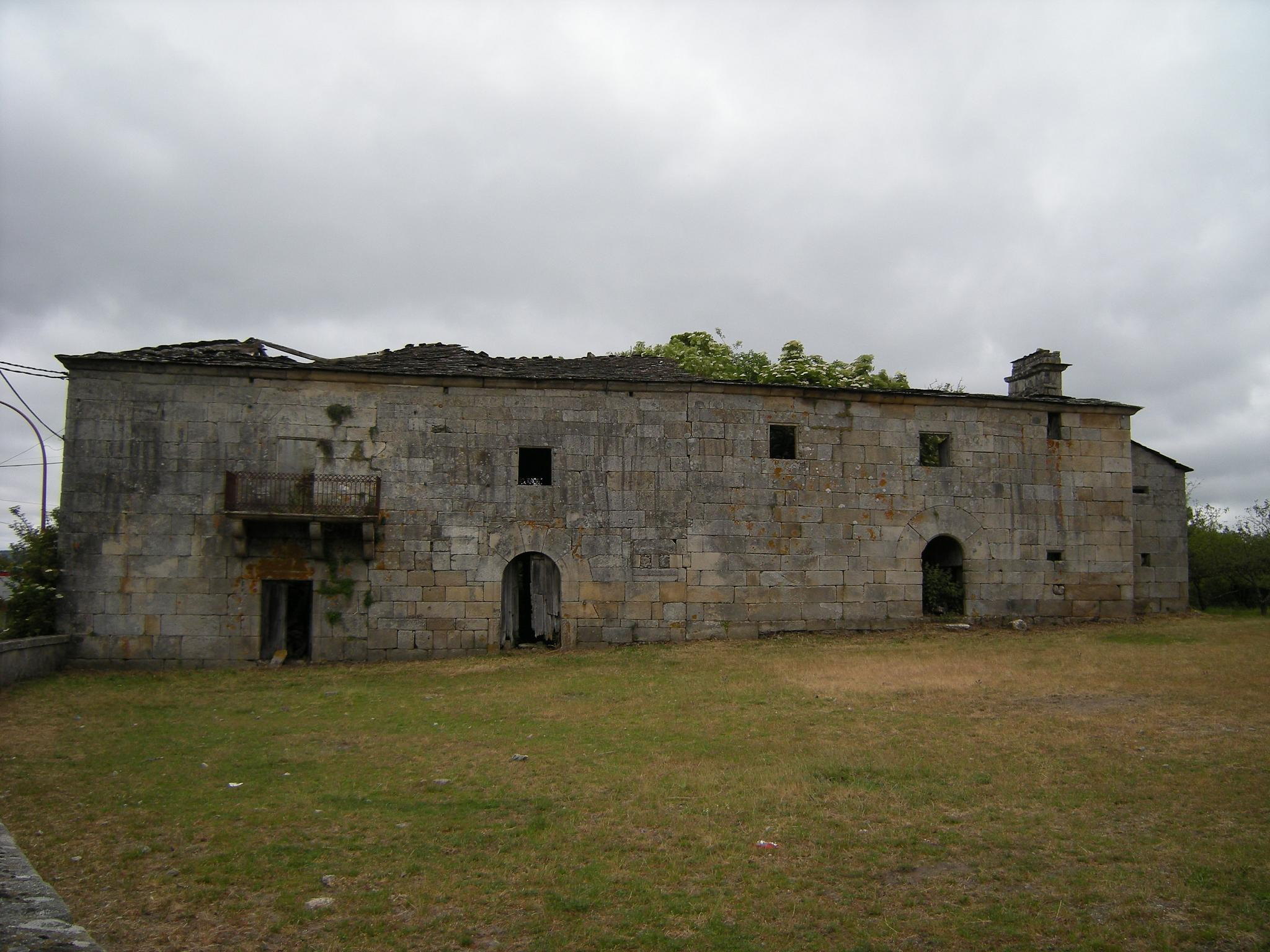 Palacio fortaleza de Friol, cuyos orígenes se remontan a la Edad Media y a la familia de los Prado.